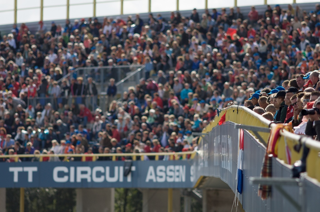 TT Circuit Assen grandstand